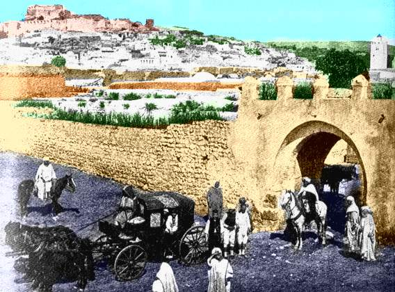 Béja in about 1900 (Tunisia)